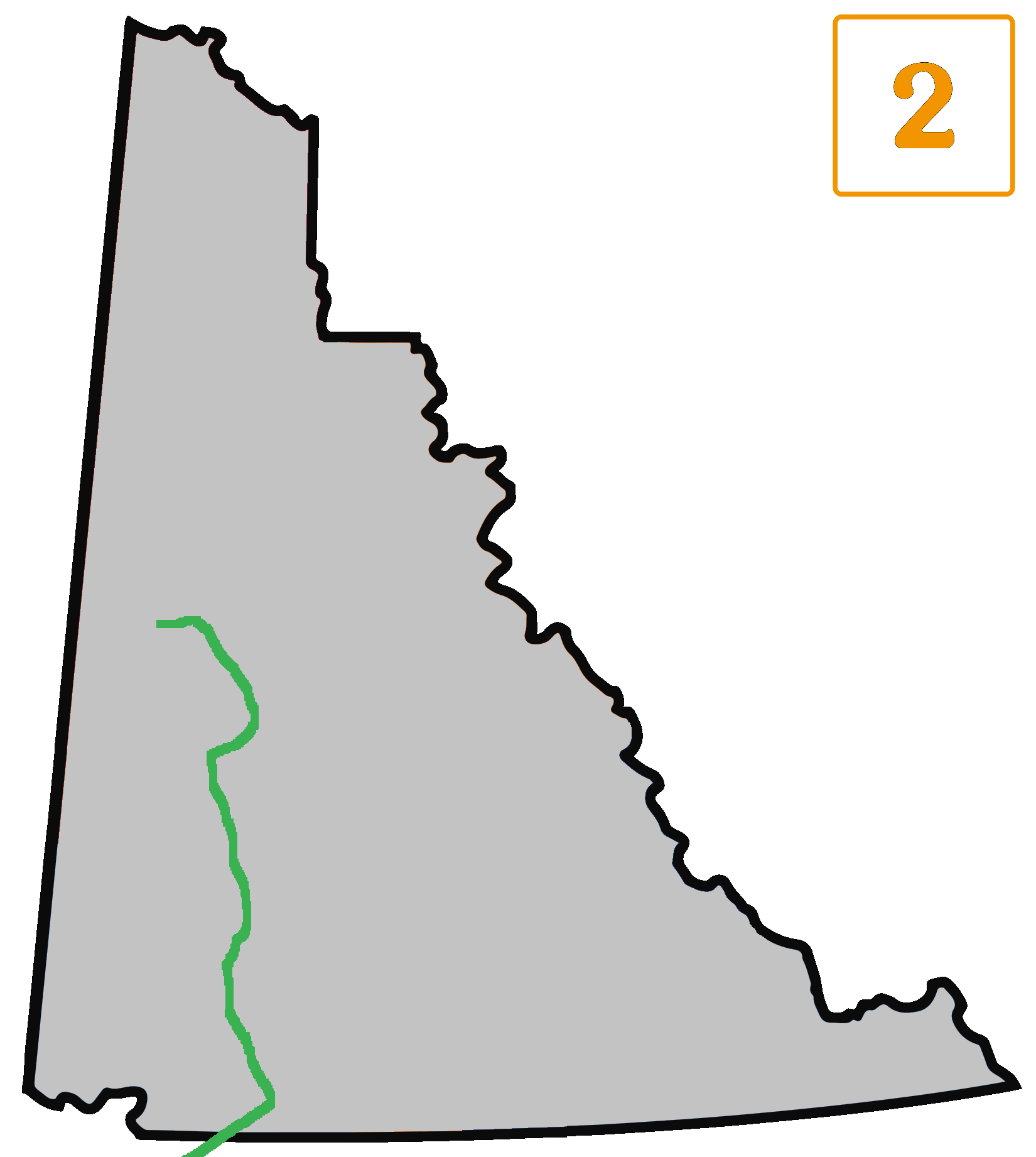 Carte de la route en Yukon